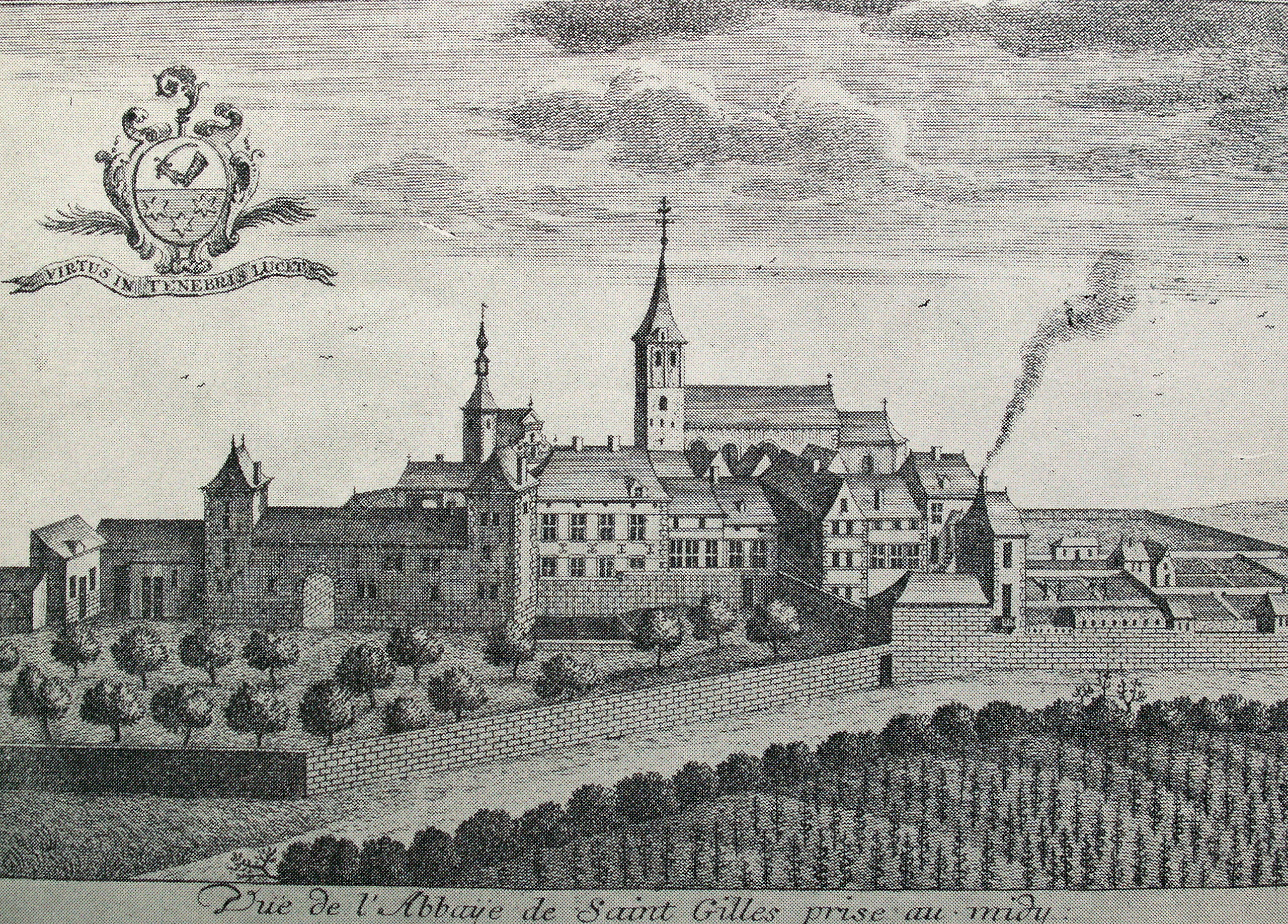 Abbaye de Saint Gilles, Liège, 1740 gravure de Remacle le Loup